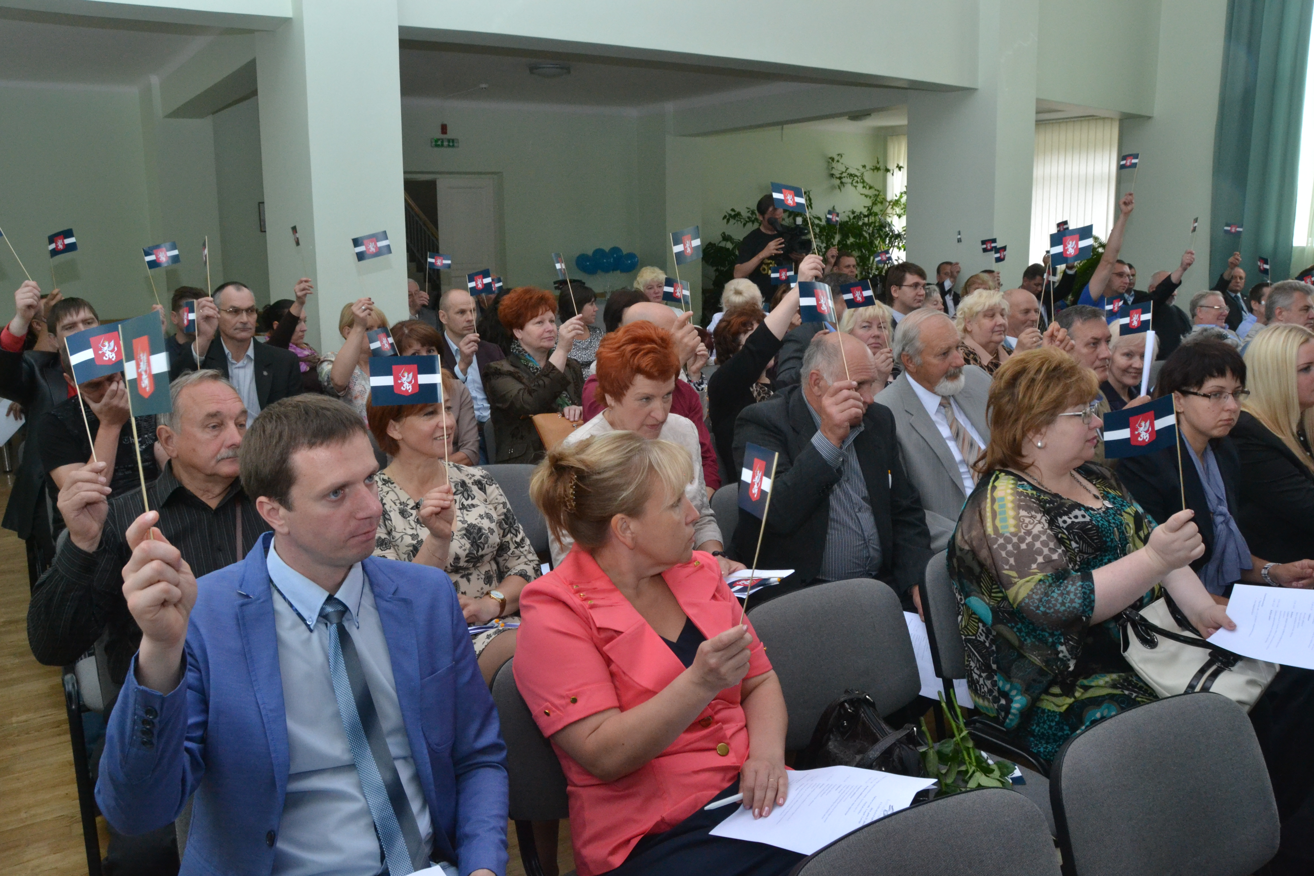 Latgales partijas kongress Aglonā